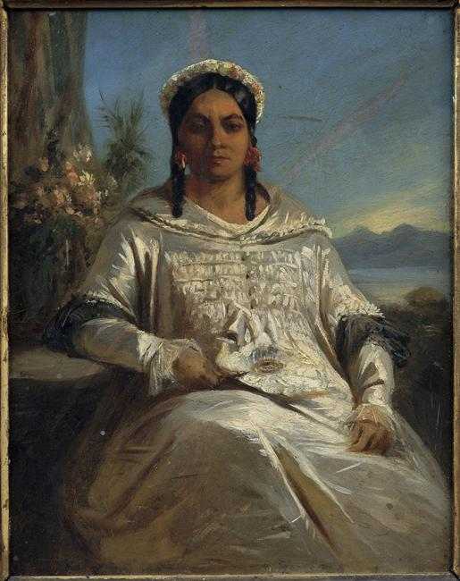 Titre: Portrait de la reine Pomaré Description: Portrait de la reine de Tahiti Pomaré Vahine IV Crédit photographique: (C) RMN / Christian Jean Technique/Matière: carton, peinture à l'huile Hauteur: 0.230 m. Longueur: 0.180 m. Localisation: Paris, musée du quai Branly Acquisition : don Albert Pasquier, 1951